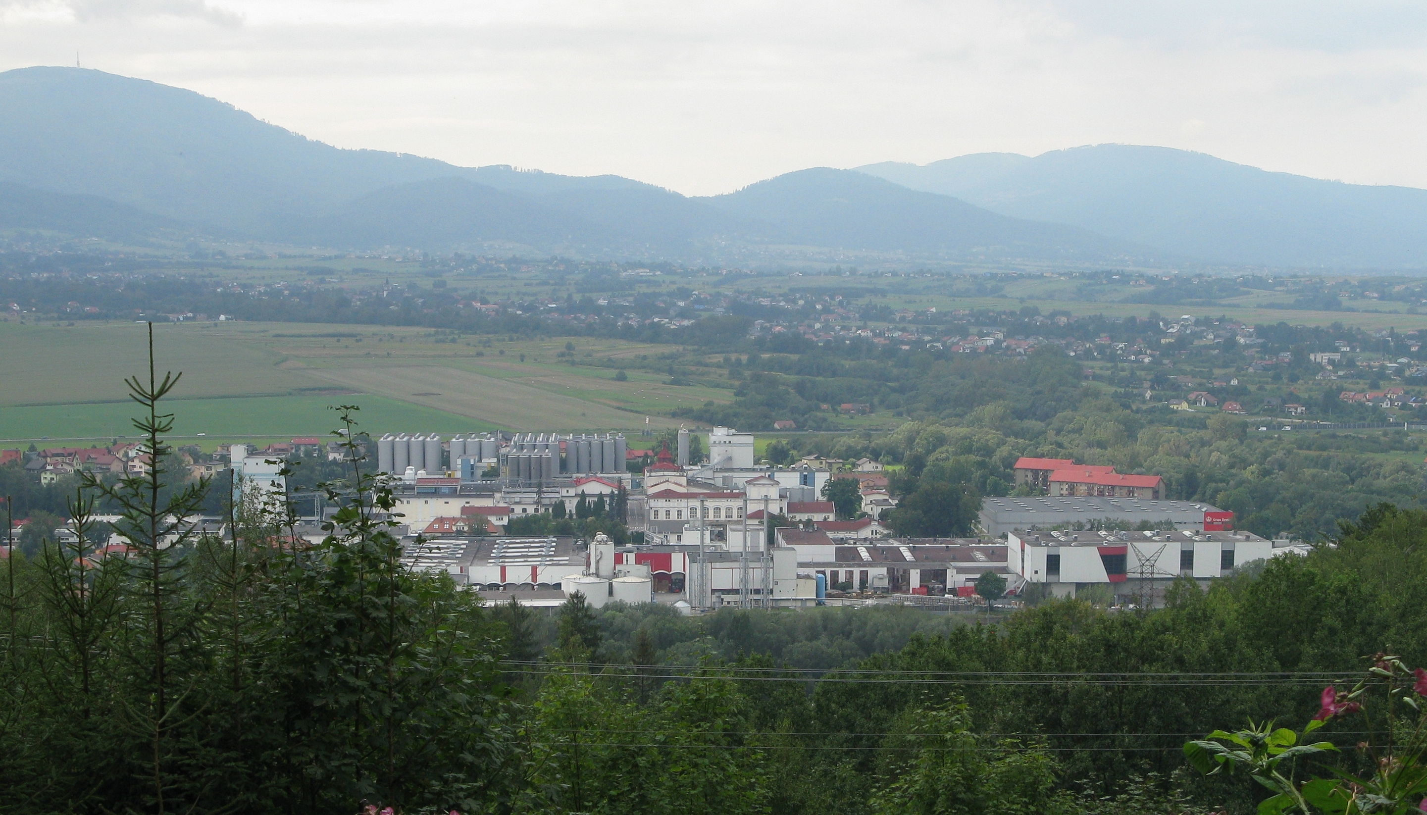 Zabudowania browaru w Żywcu ze stoku Grojca.